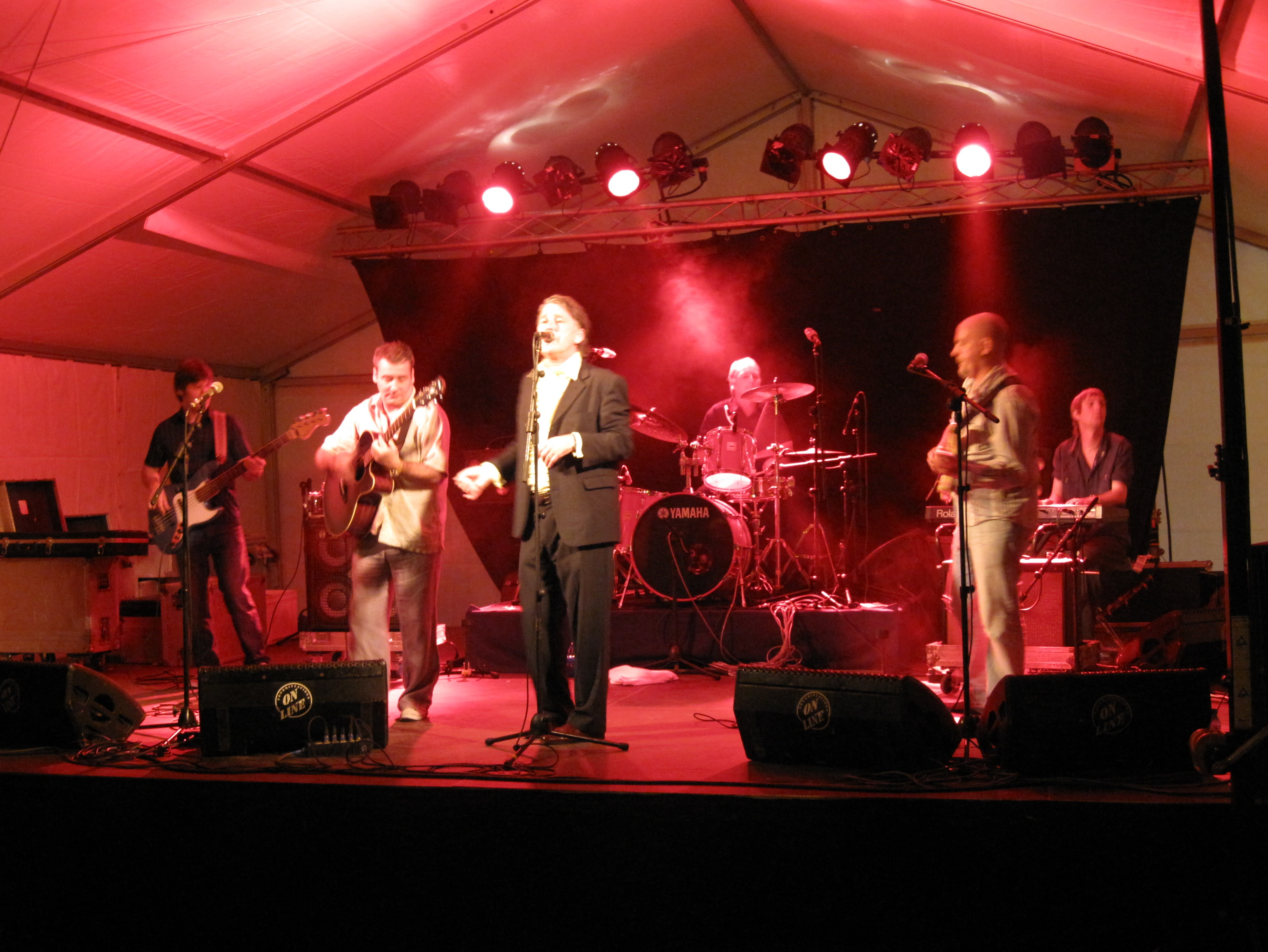 Konzert der Band China Crisis in Cala Millor, Gemeinde Son Servera, Mallorca, Spanien